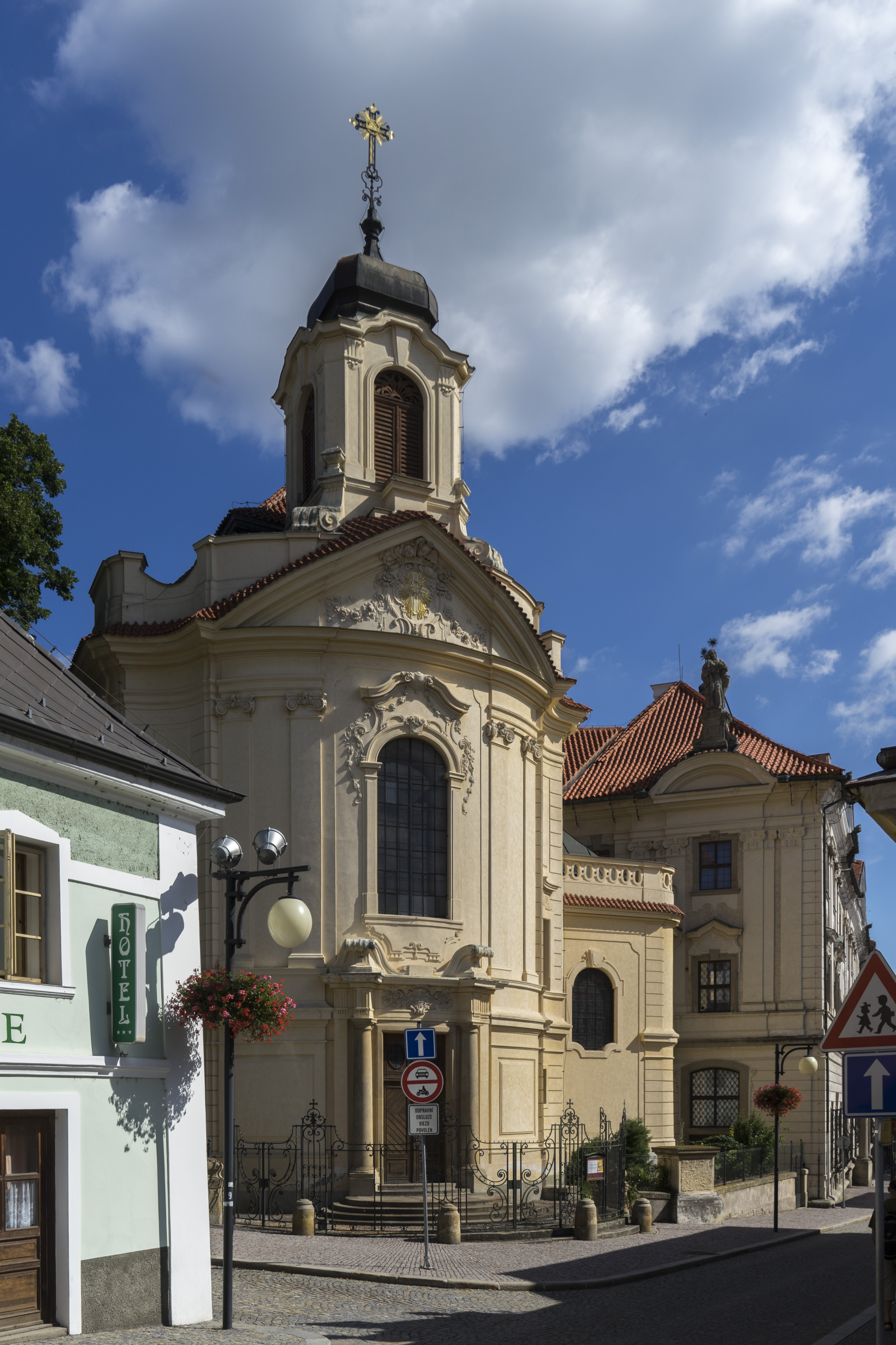 Ursuline monastery, Kurna Hora